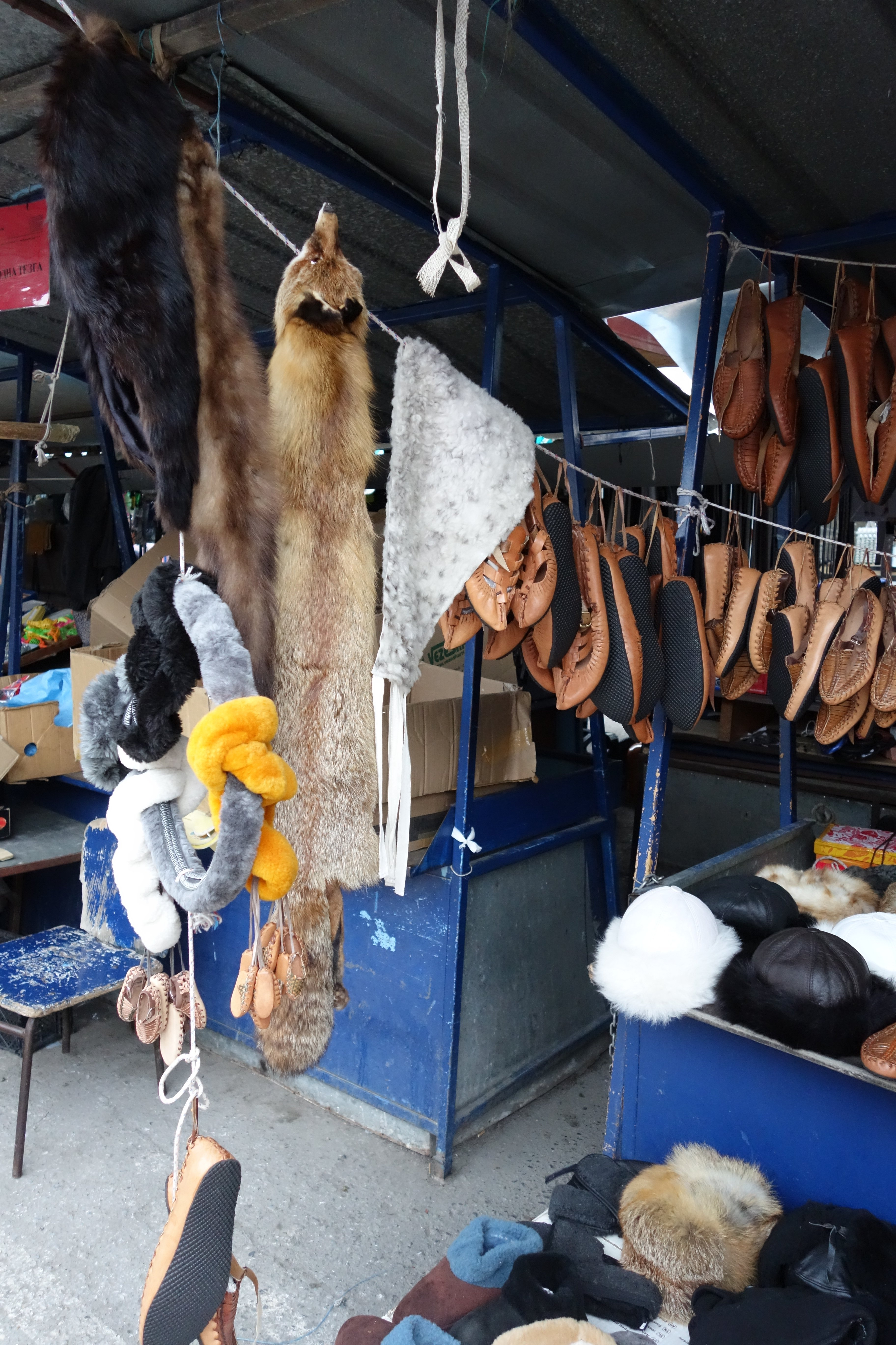 Auf dem Markt in Ohrid, Mazedonien